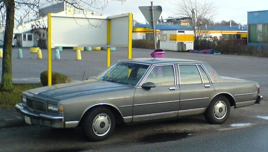 Caprice Classic von 1987-1989 Selbst fotografiert 11/2005